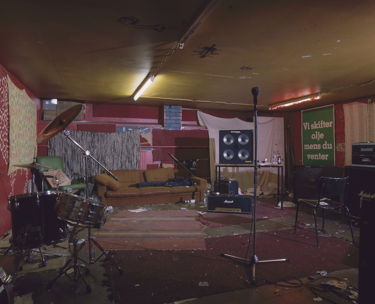 Lepakkoluola, bändin treenikämppä.